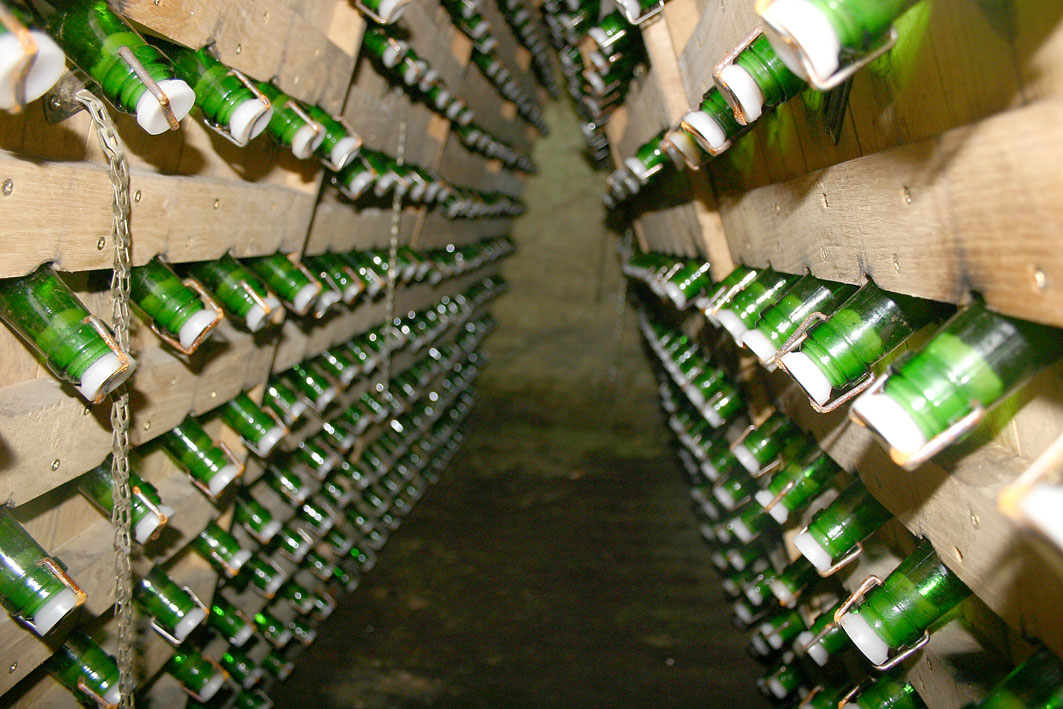 Sektkellerei in Artjomowsk, Ukraine